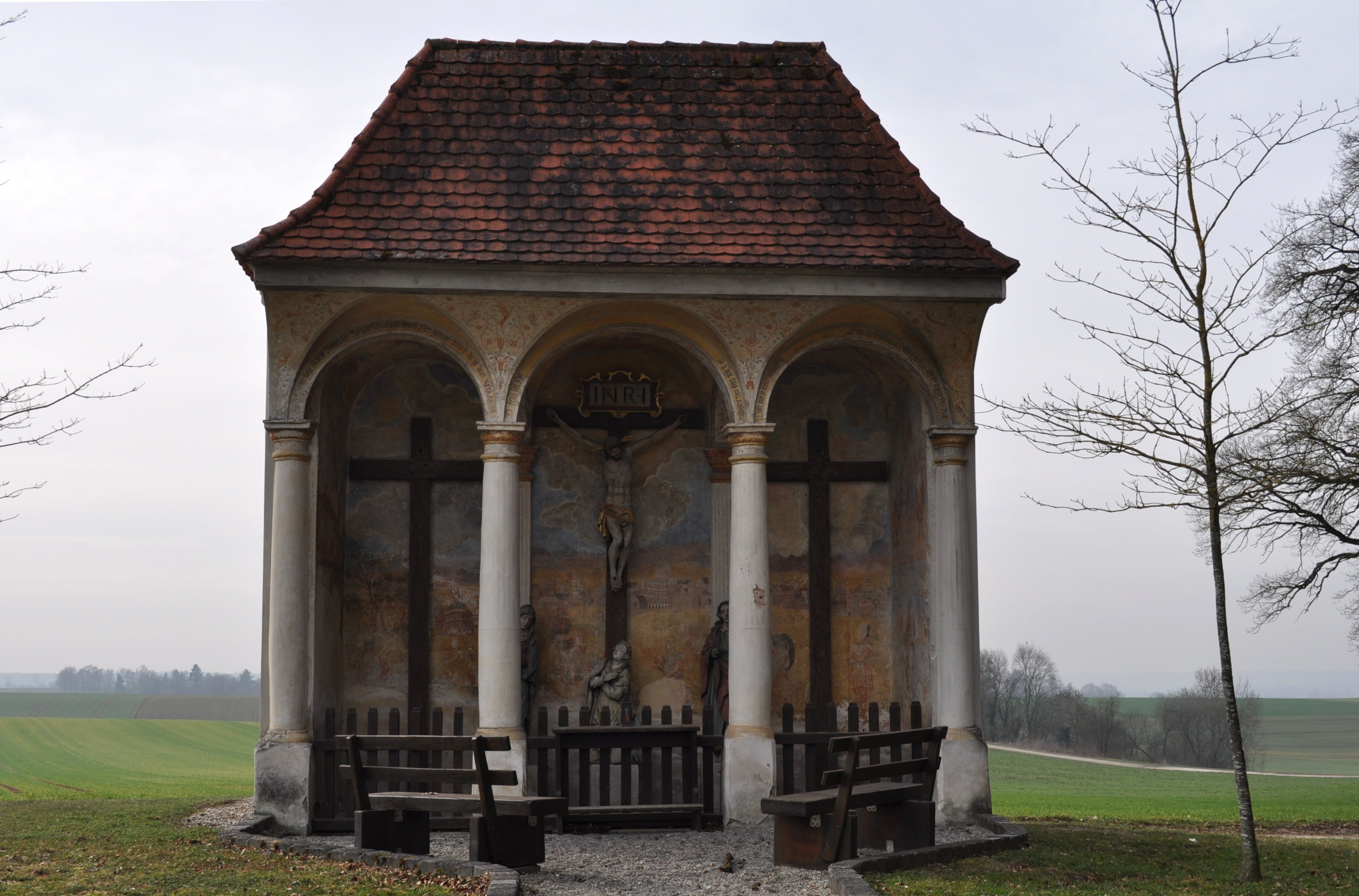 Herrgottsruhkapelle am Ortsrand von Haldenwang (Schwaben)